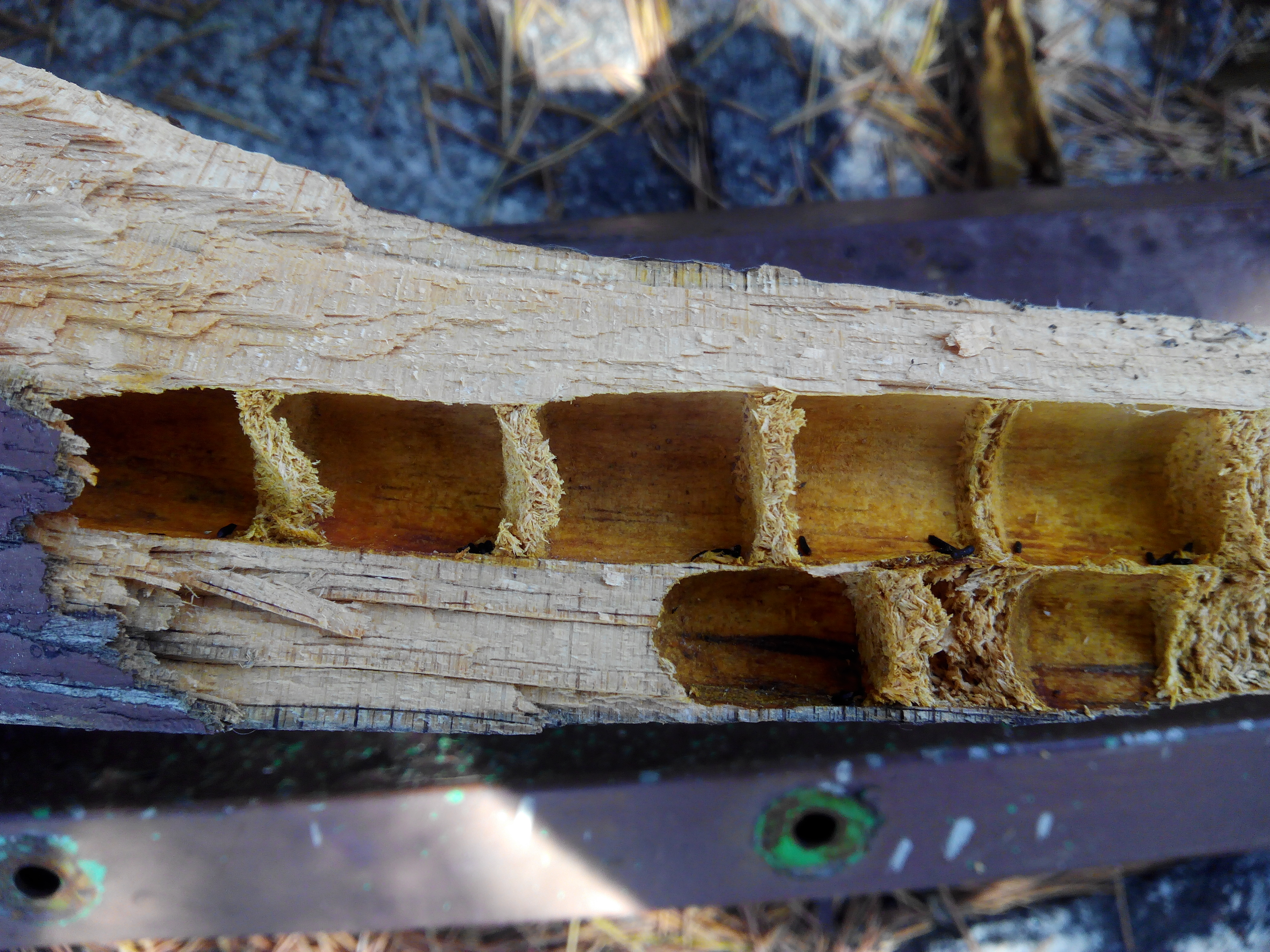 Nidos en la madera donde se encontraban larvas de Xilocopa violacea